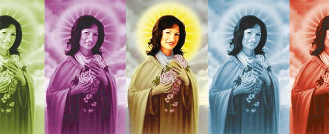 Più privato meno pubblico, meno studenti più manager: questo è l’indirizzo generale a cui tende la riforma universitaria, smantellando il diritto allo studio. Un diritto costituzionalmente garantito per l’emancipazione dei ceti meno abbienti